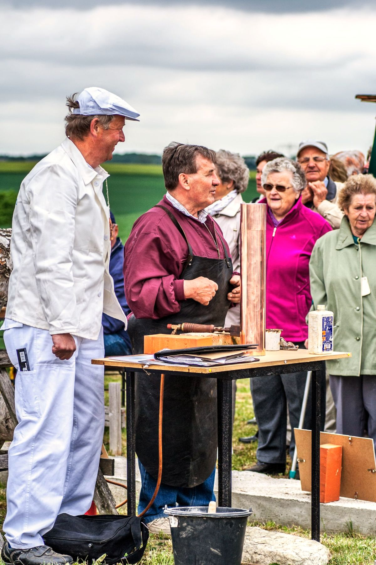 Angermünder Kunstschmiedemeister Wilfried Schwuchow Grundsteinlegung Greiffenberger Mühle Mai 2013